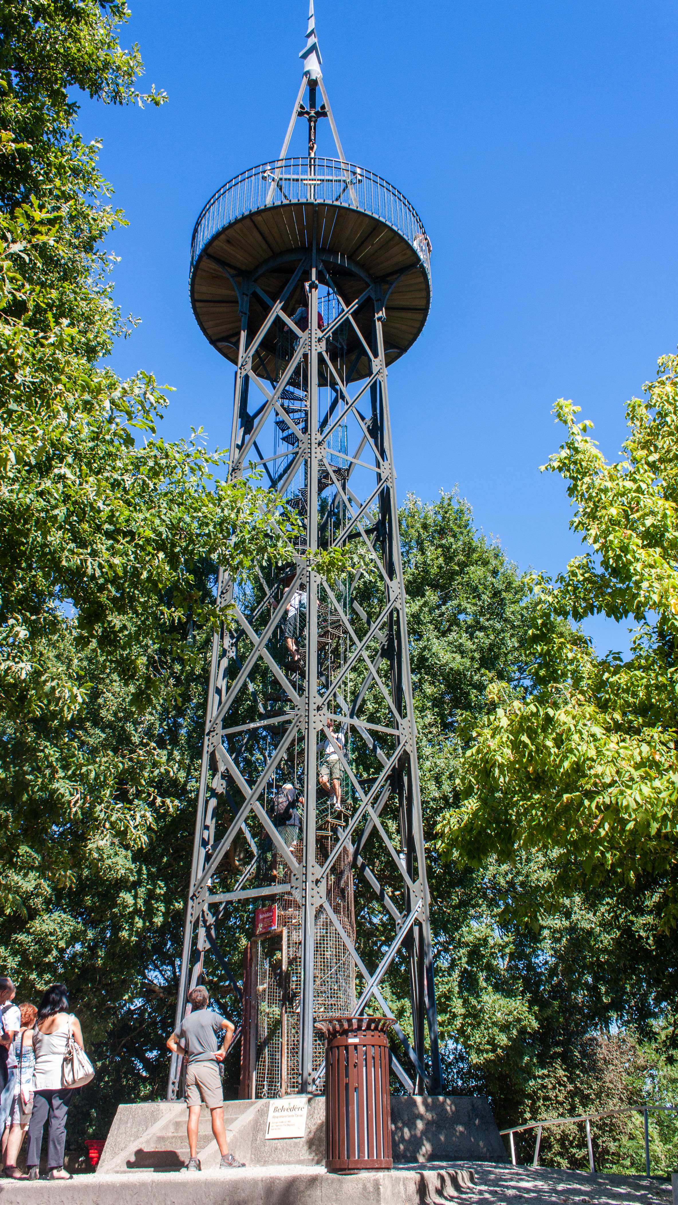 Tour métallique de 25 mètres de hauteur (belvédère) ou 32 mètres (sommet), conçu en 1863 par Paul Régnauld. De nombreuses personnes attendent en bas car il est spécifié que le nombre de personnes admises sur la tour est de 8.